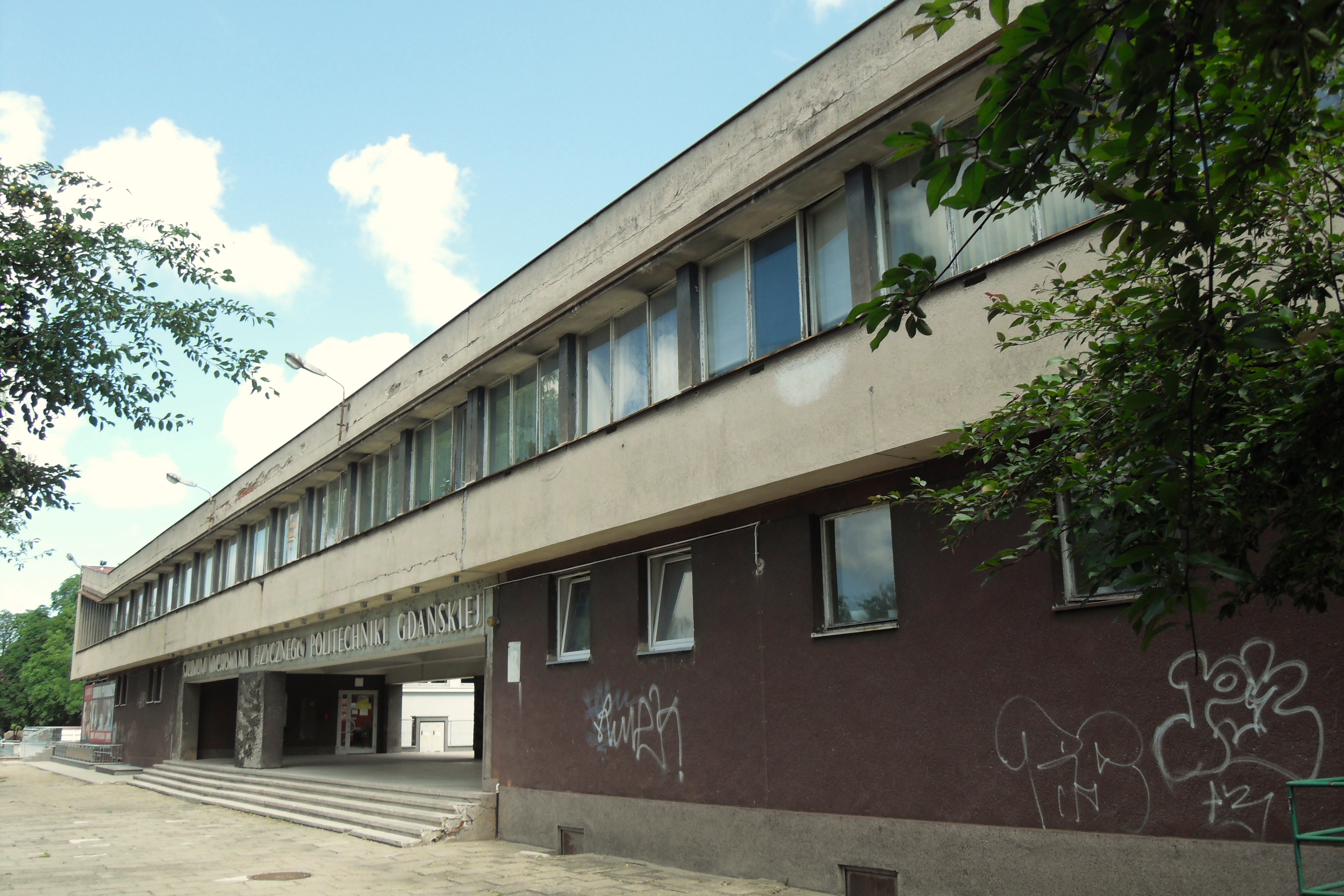 Gdańsk Aniołki, Studium Wychowania Fizycznego Politechniki Gdańskiej, al. Zwycięstwa 12.